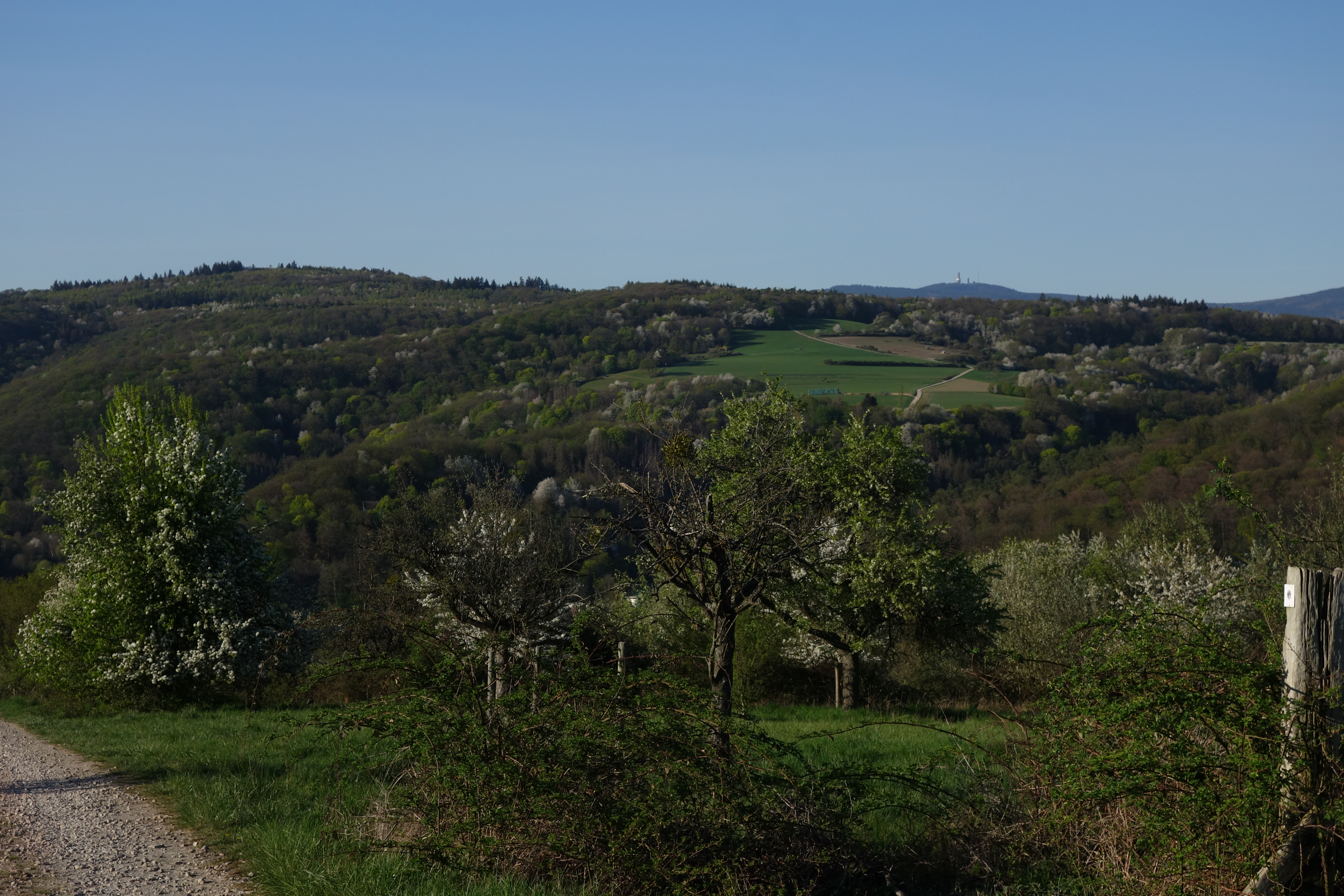 Staufen (links) und dessen Nebenkuppe Hahnenkopf (Mitte, 361,2 Meter) von Süden betrachtet, oberhalb Lorsbachs. Halbrechts im Hintergrund der Große Feldberg.